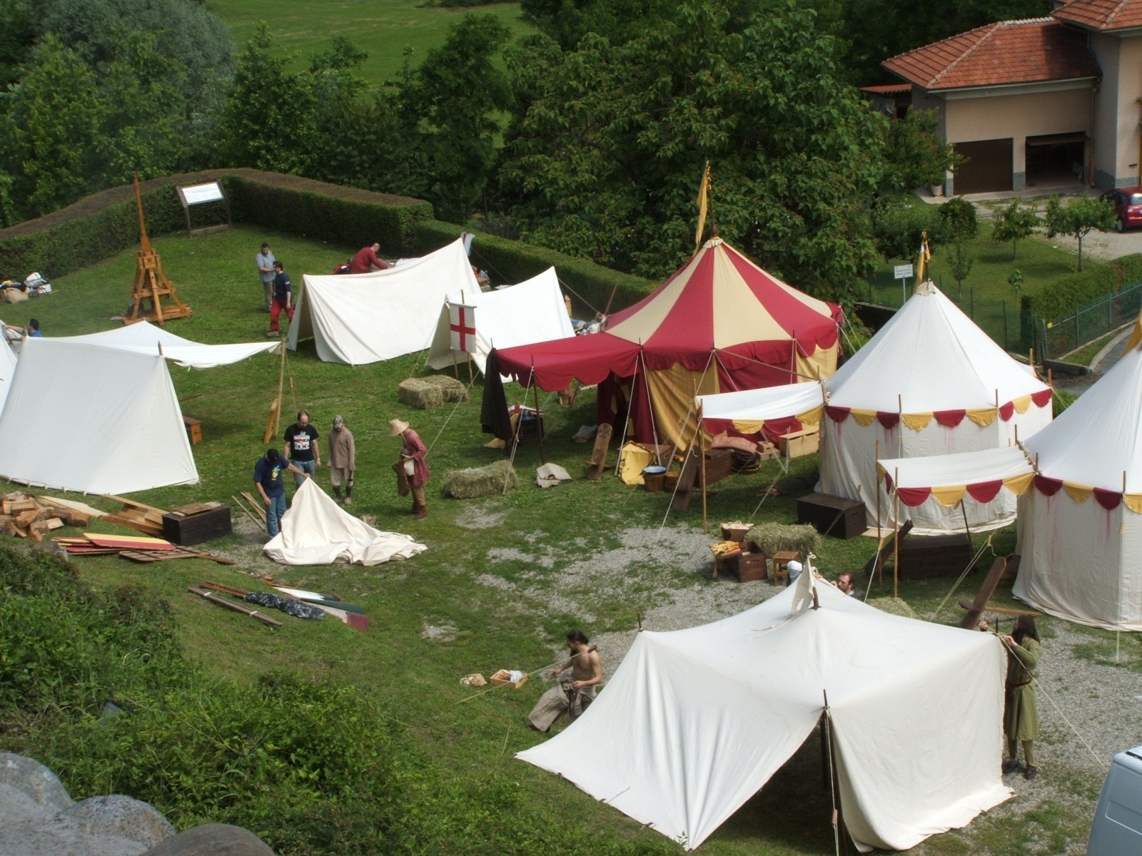 Ricetto di Candelo, provincia di Biella, Piemonte, Italia